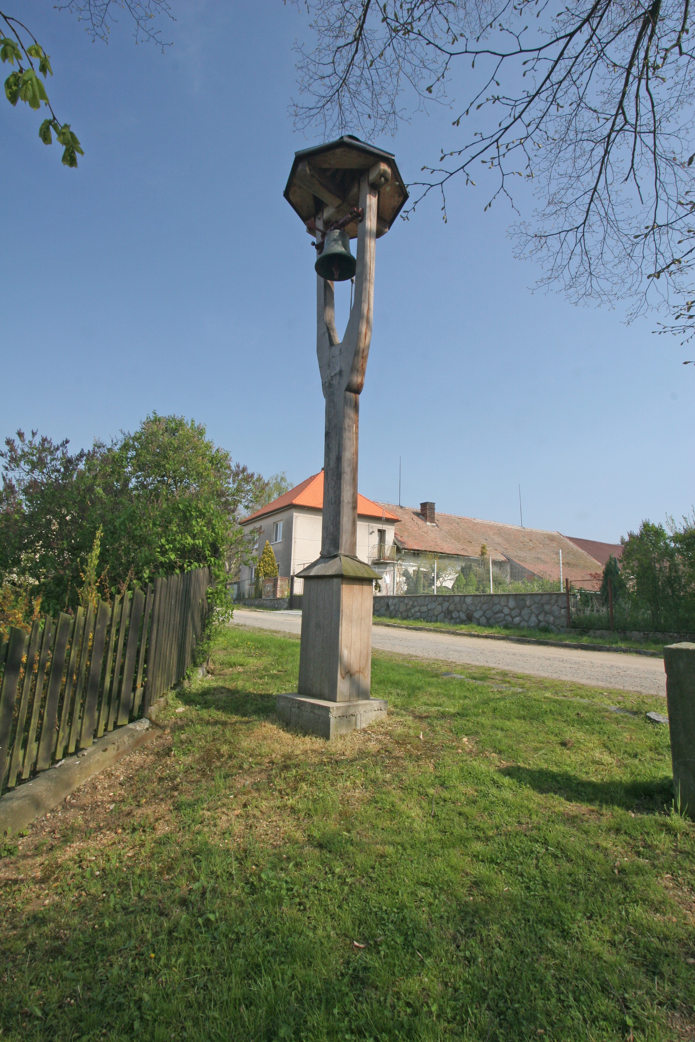 Barchov zvonička